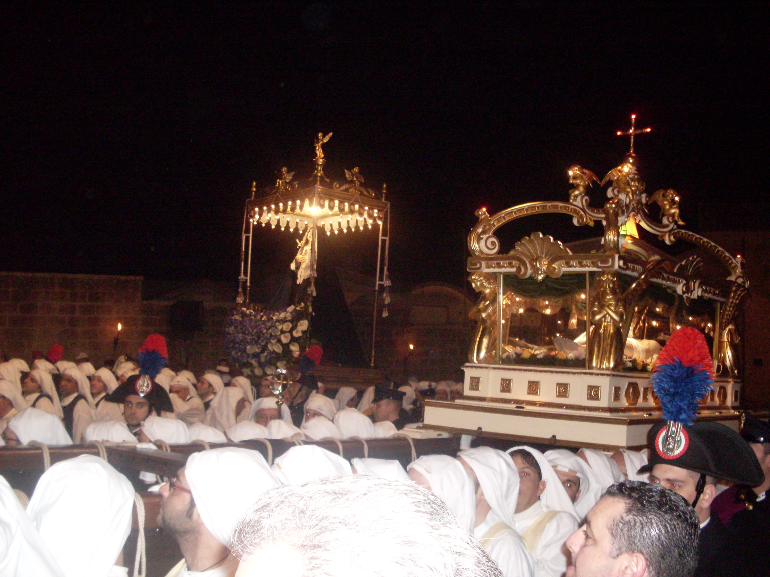 I due fercoli al Cimitero in attesa della Benedizione